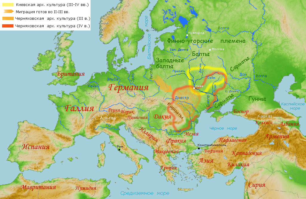 Maps of Kievan (III-IV c.) and Chernyakhov archaeological cultures. Ареалы распространения киевской (желтым цветом) и черняховской археологических культур. Показаны ареалы черняховской культуры в период скифских войн III века и в период могущества готского государства в IV веке. Ареал черняховской культуры IV века указан по карте из публикации В.В. Седова «Этногенез ранних славян», ареал III века взят из статьи археолога Б.В. Магомедова «Этнические компоненты черняховской культуры». Ареал Киевской культуры нарисован по карте из : Терпиловский Р.В. Ранние славяне Подесенья III-V вв. К. - 1984..